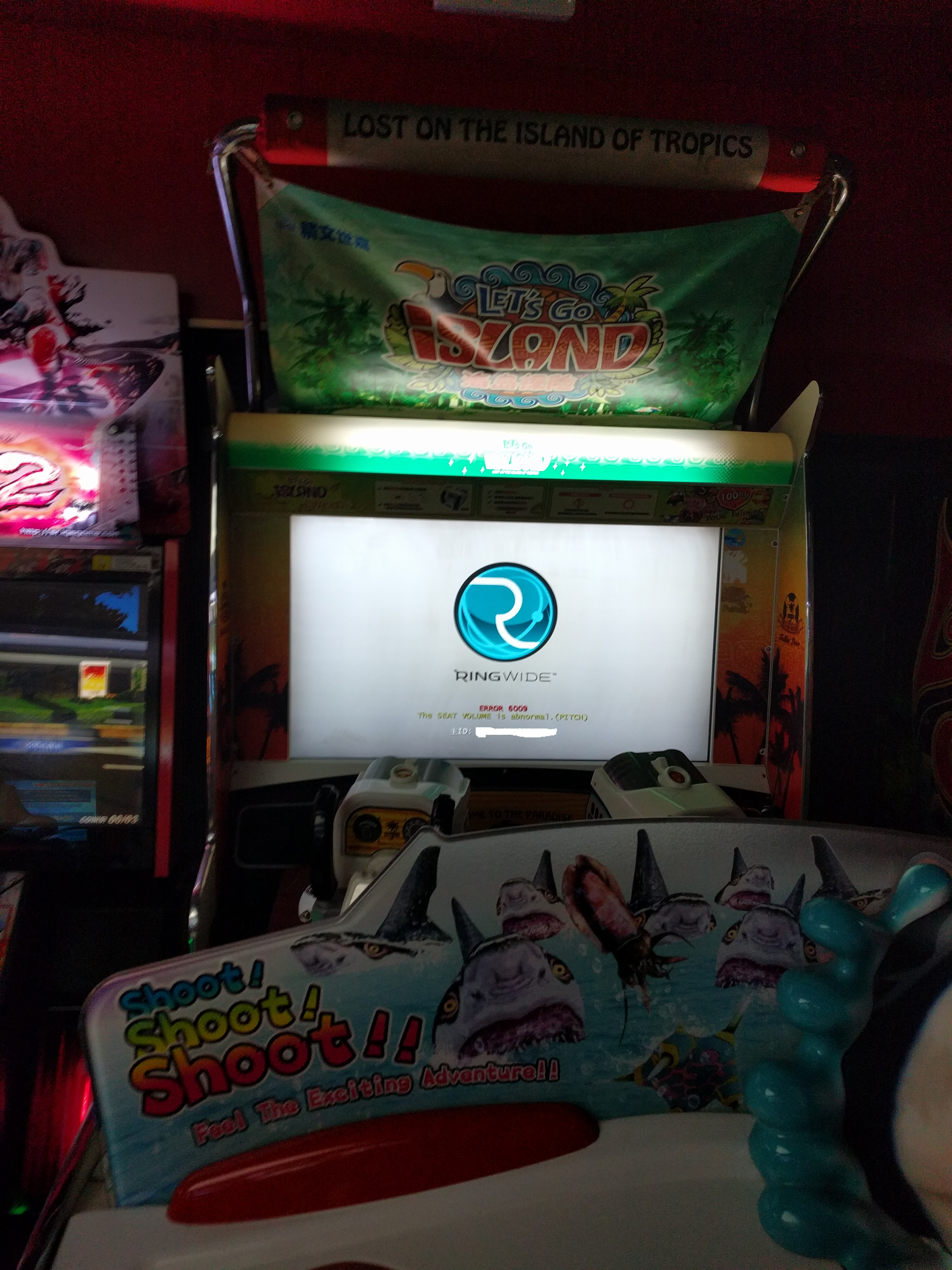 Let's GO ISLAND中文版海岛探险，拍摄时有问题没开机。